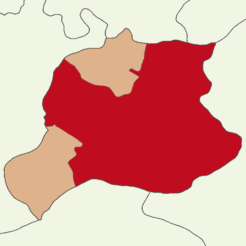 Bayburt Merkez ilçesinin konumu